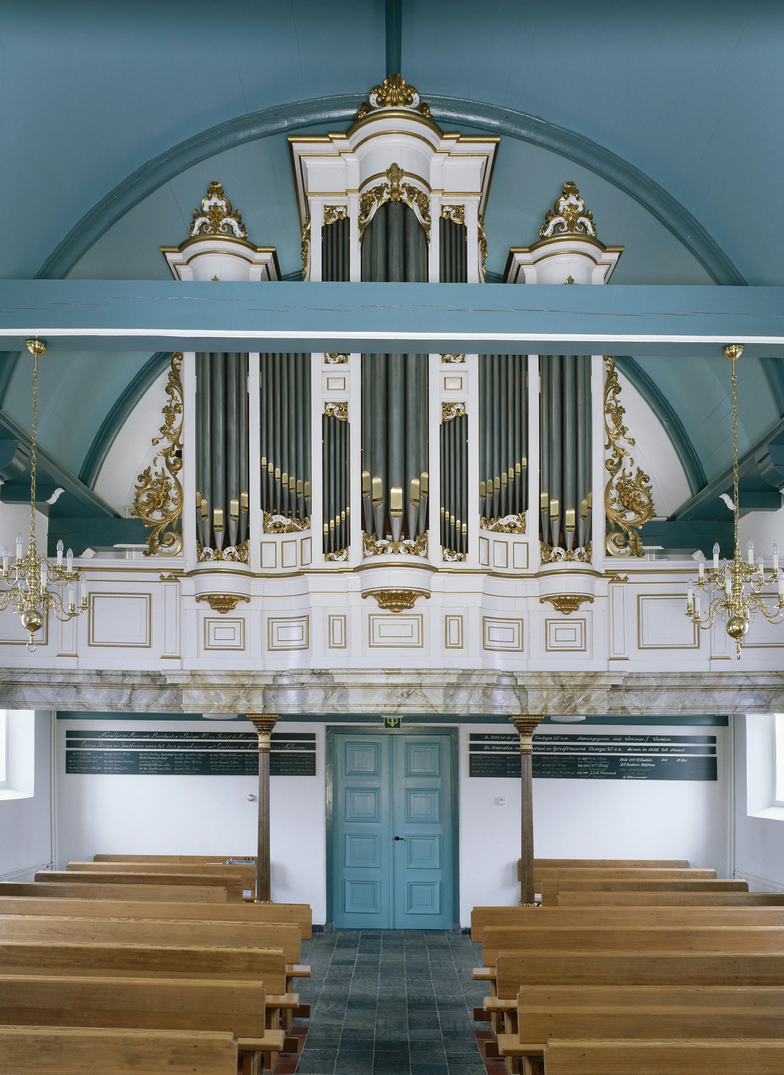 Nederlands Hervormde Kerk: Intenieur, aanzicht orgel, orgelnummer 1190 (opmerking: Gefotografeerd voor Het Historische Orgel in Nederland 1872-1878, bladzijde 111)